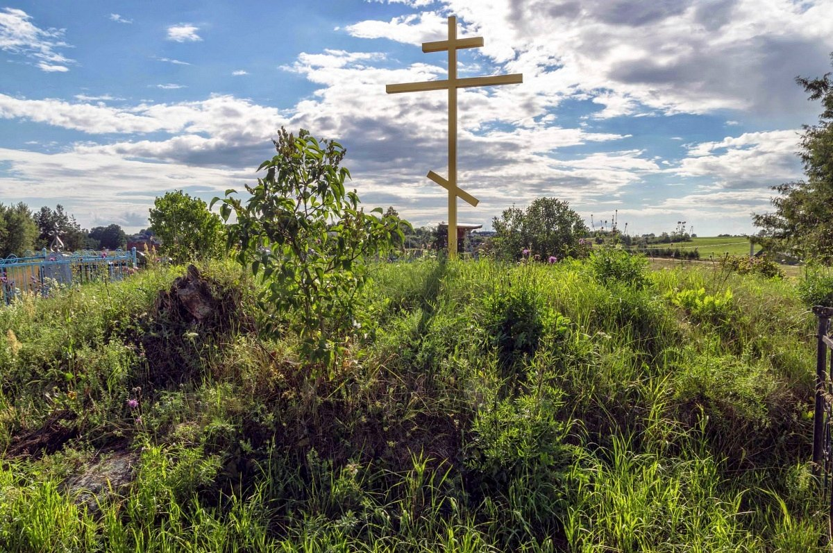 Галубічы. Падмурак царквы